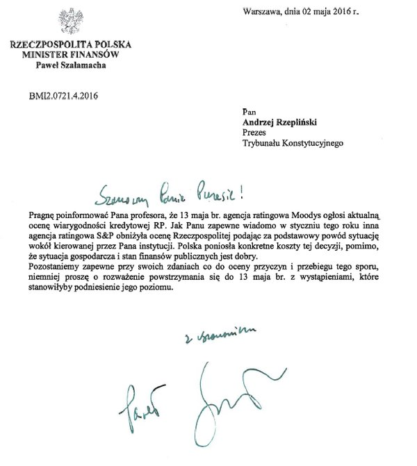 List ministra finansów Pawła Szałamachy do prezesa Trybunału Konstytucyjnego Andrzeja Rzeplińskiego z dnia 2 maja 2016